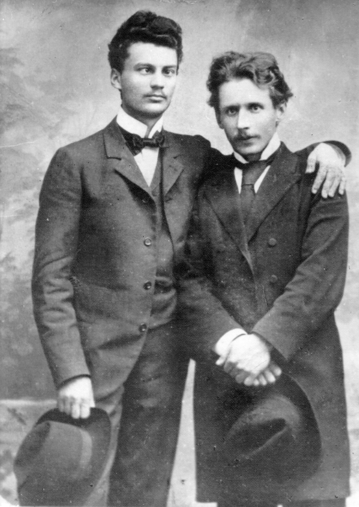 Чюрлянис с другом Эугениушем Моравским-Домброва